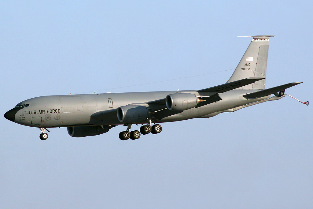 Moron de la Frontera AB, Spain